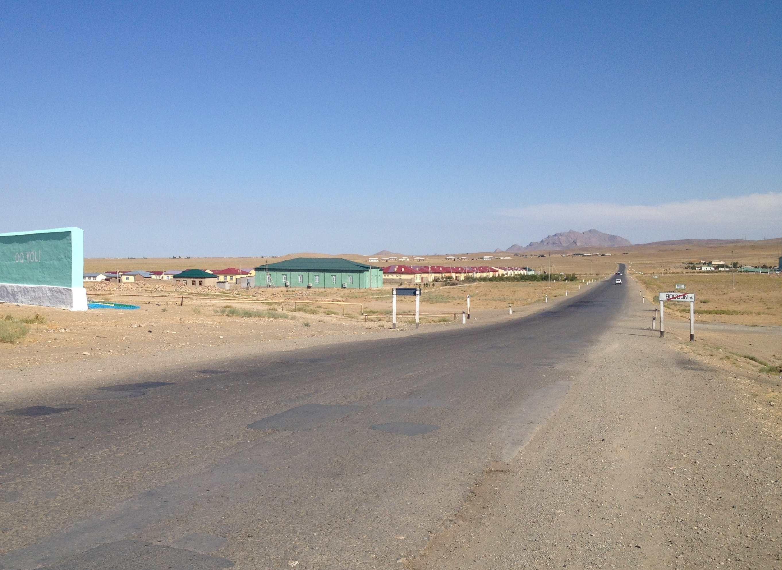 Автодорога 4р3Б близ Янгикишлака (Фаришский район)